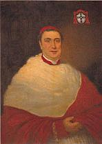 Cardinale Giacomo Piccolomini (1795 - 1861)